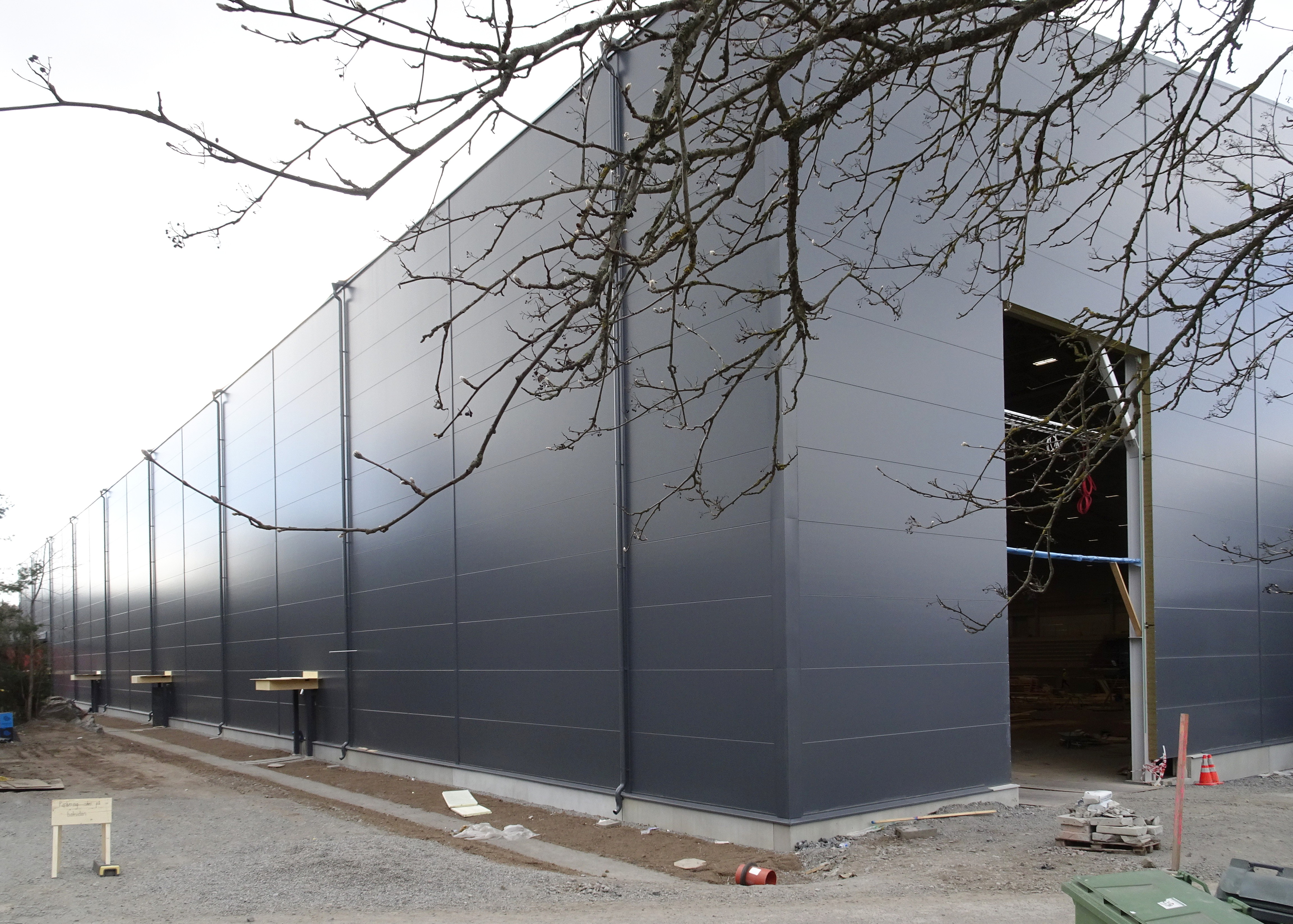 Bandyhallen i Gubbängen